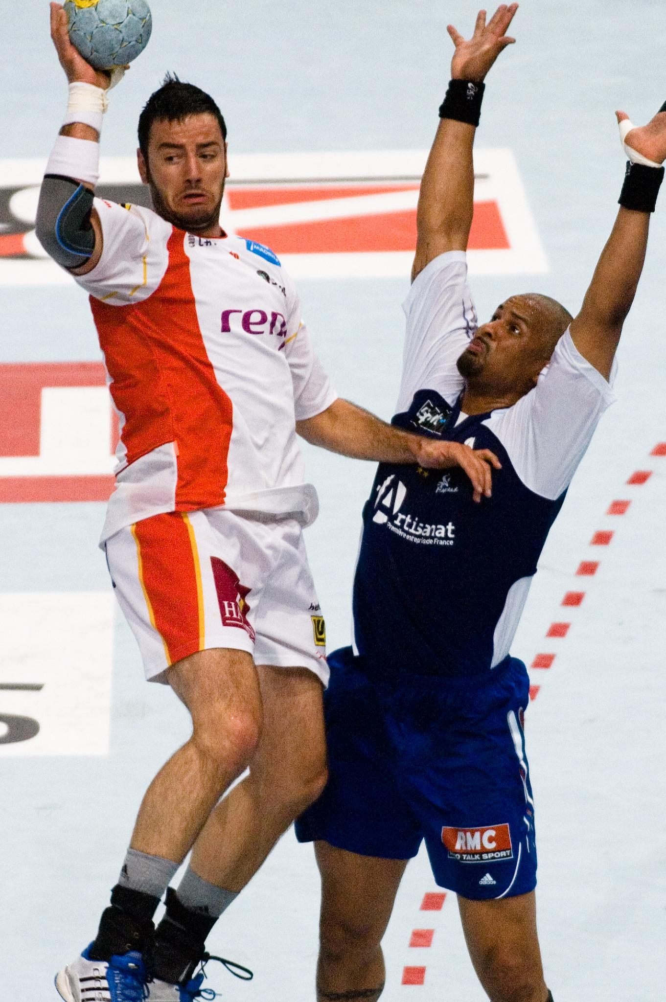 Didier Dinart au contre face à Iker Romero pendant le match France-Espagne joué à Paris Bercy lors du tournoi de qualification pour les Jeux olympiques de Pékin 2008.